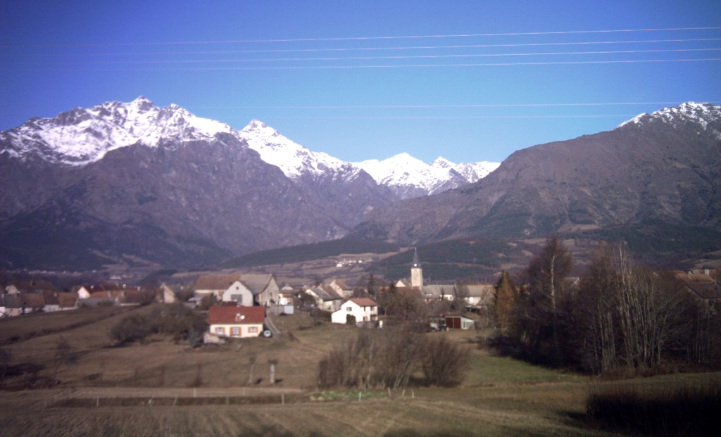 Le village de Poligny vu de l'ouest. Au fond, la vallée de Molines.